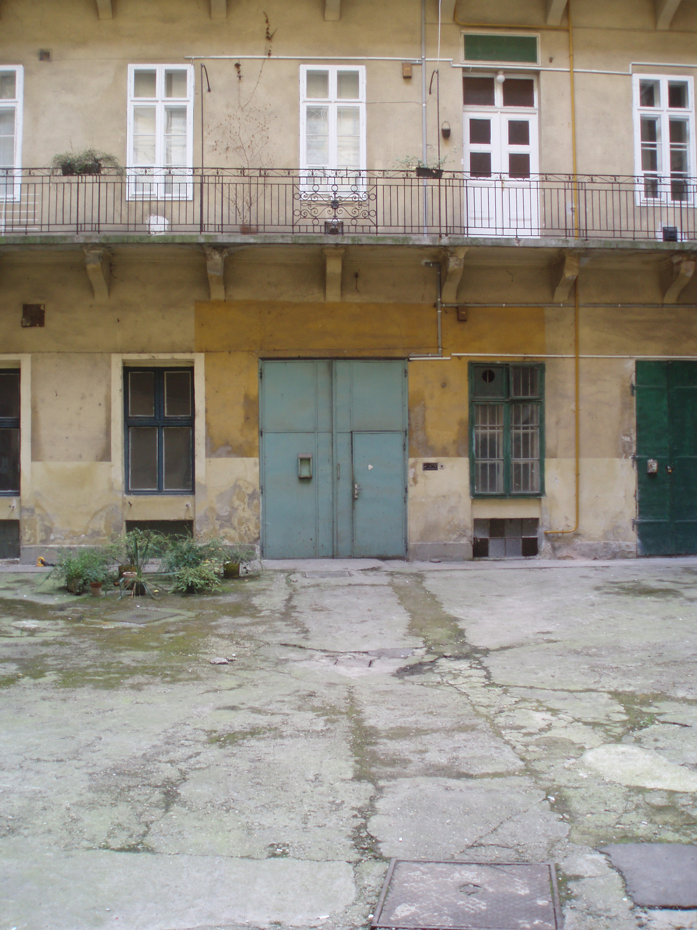 Átjáró a Rákosi-bunkerhez a szemközti ház udvarából (Budapest-Lipótváros, Zoltán u. 13.)